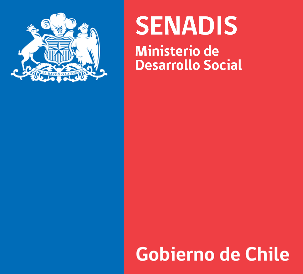 Logo Institucional del Servicio Nacional de la Discapacidad.